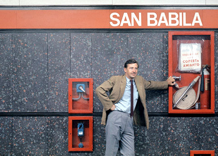 1964, Milan (Italy), designer Bob Noorda in metropolitan's station San Babila - M1 (Linea Rossa) Immagine del 1964 vedi